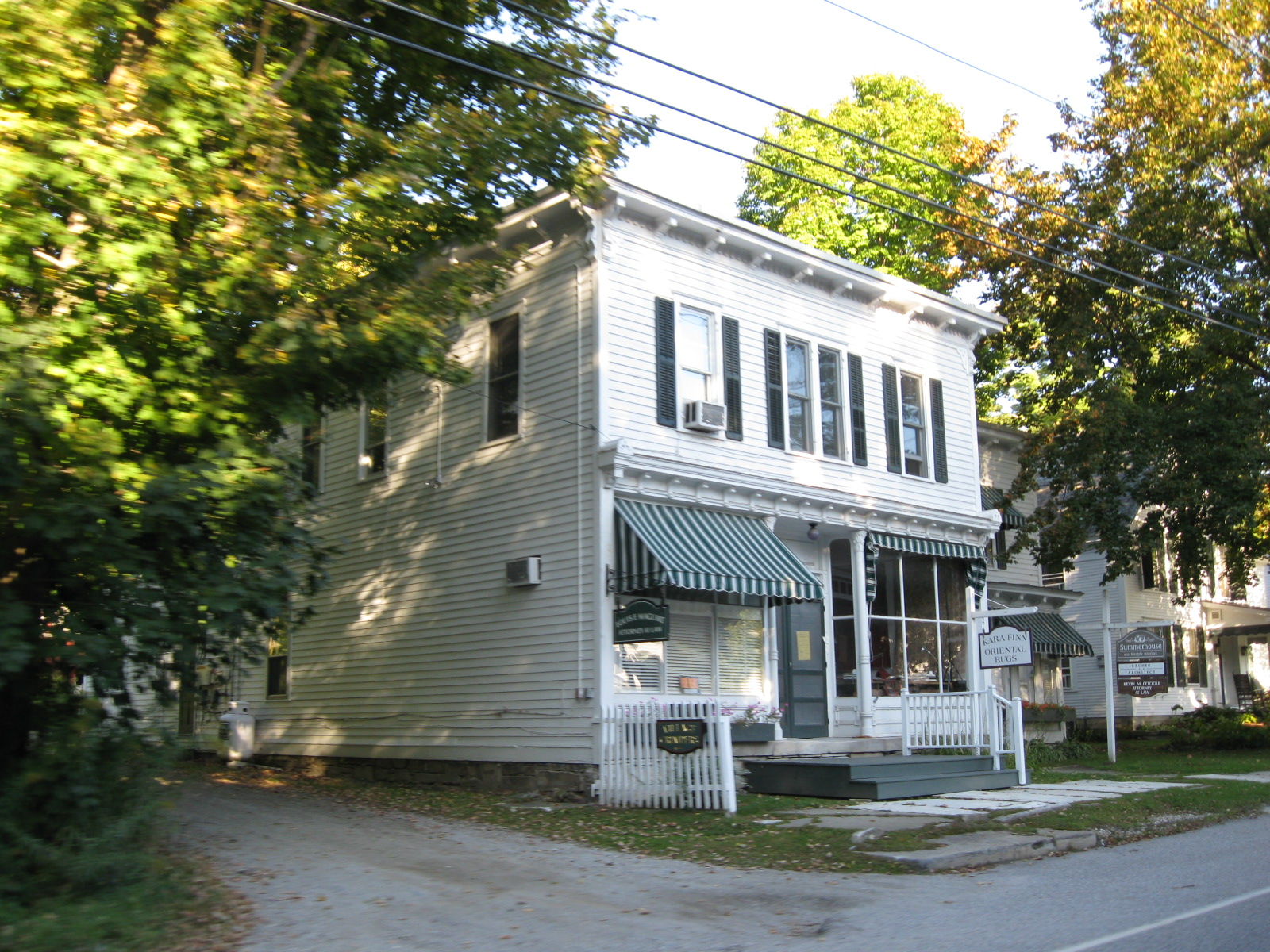 A shop in Dorset Village, Vermont.